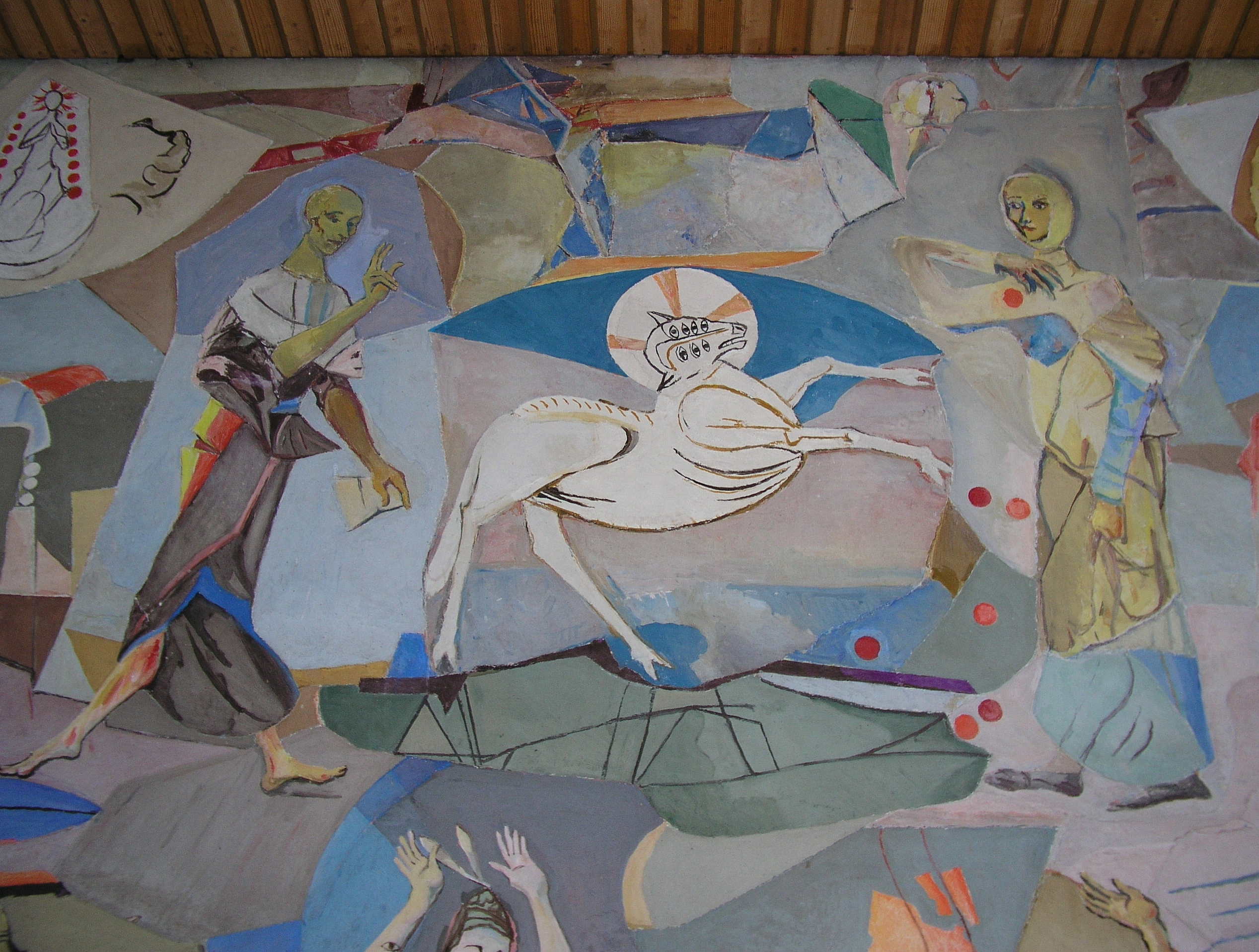 Basilika Seckau, Engelskapelle, Fresko "Seckauer Apokalypse" von Herbert Boeckl, 1952-1960: Das Lamm mit den sieben Augen und 2 Engel